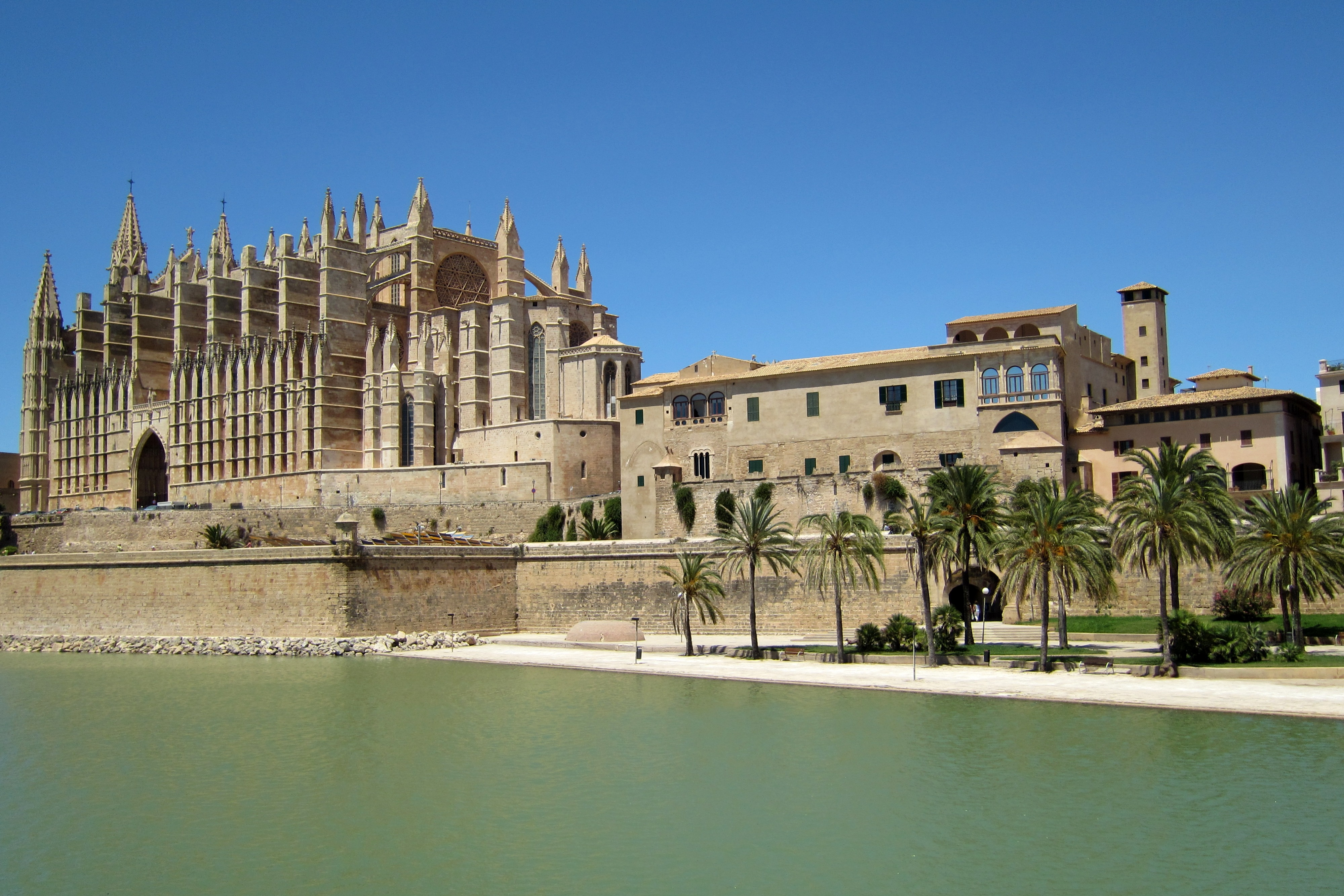 La Seu und Bischofspalast, Palma de Mallorca